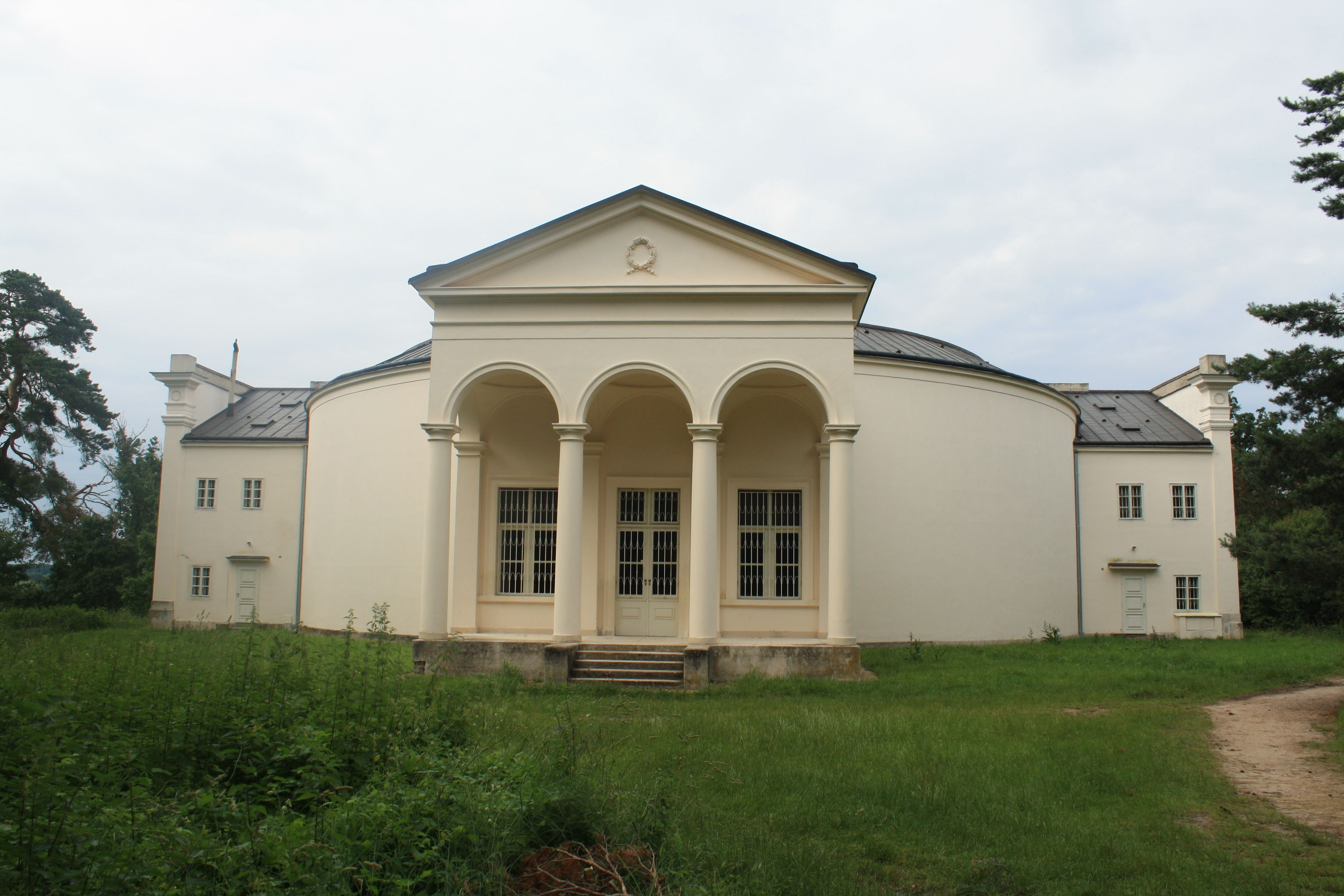 Tempel Blick von den Drei Grazien zu dem Teichschlösschen bei Valtice in Tschechien